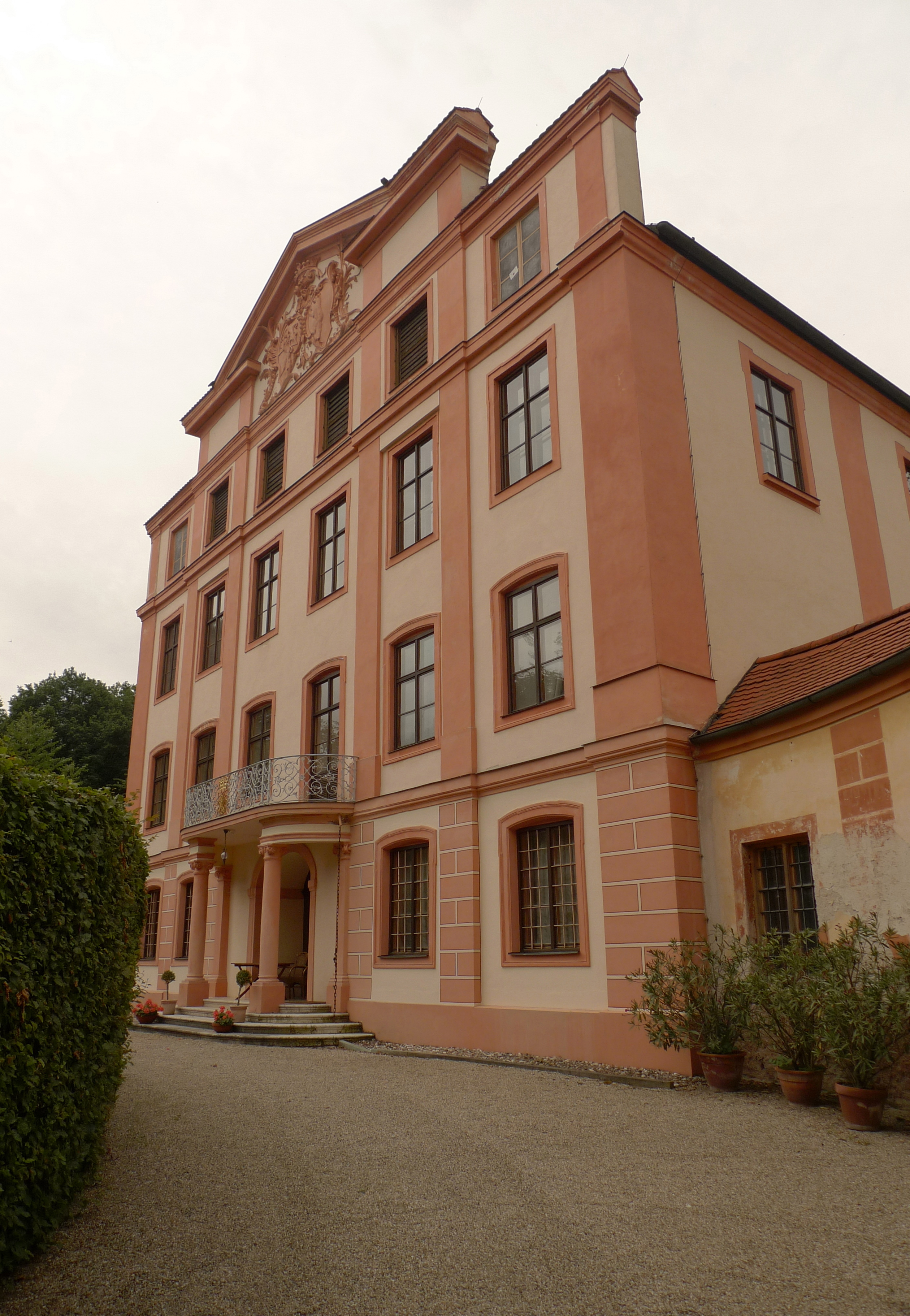 Erste Station der Emigration war für die Familie Meyer Schloss Rohrbach an der Ilm.